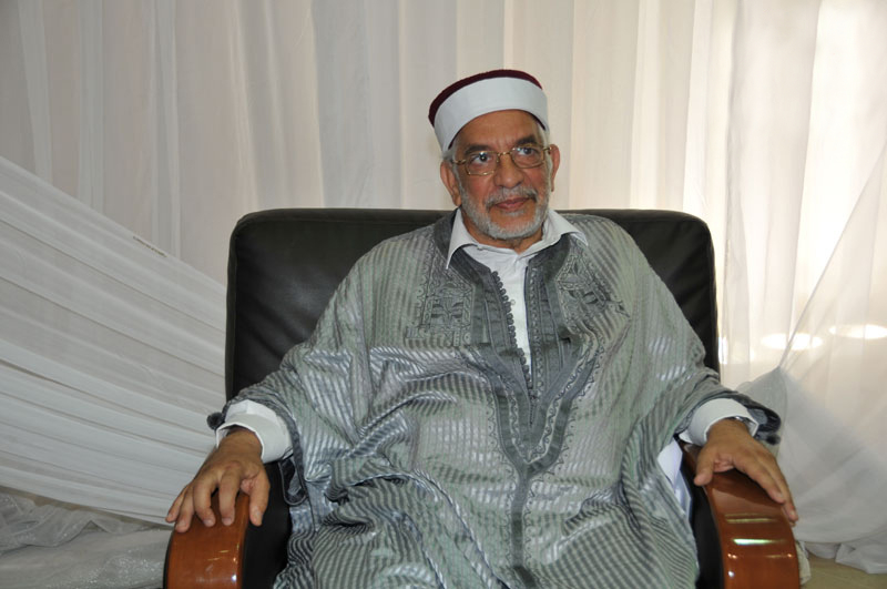 Abdelfattah Mourou lors d'une colloque sur l'économie tunisienne, le 11 juin 2011, à Sousse